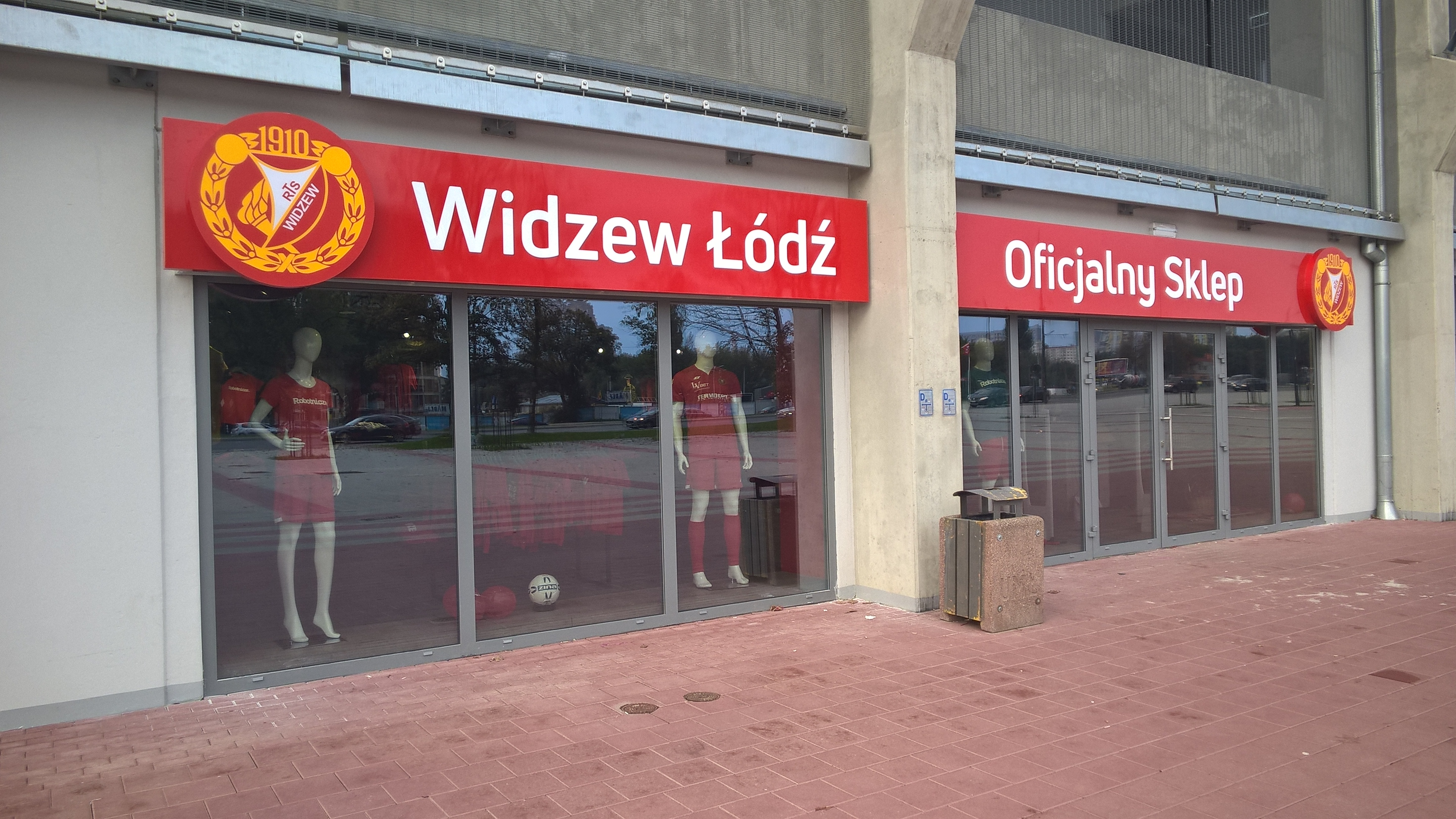 Nowy stadion Widzewa – oficjalny sklep klubowy pod trybuną "D" (wrzesień 2017)